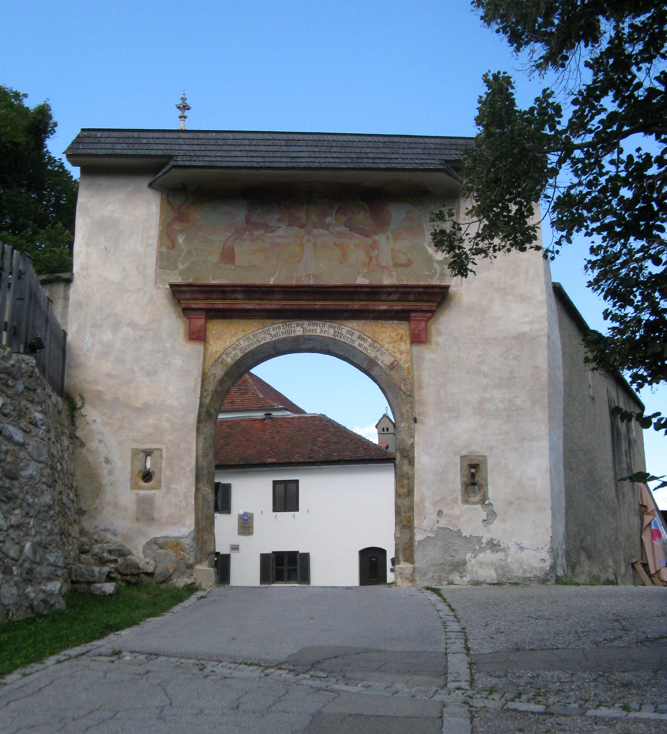 Maria Straßengel, Tor zum Kirchenvorplatz